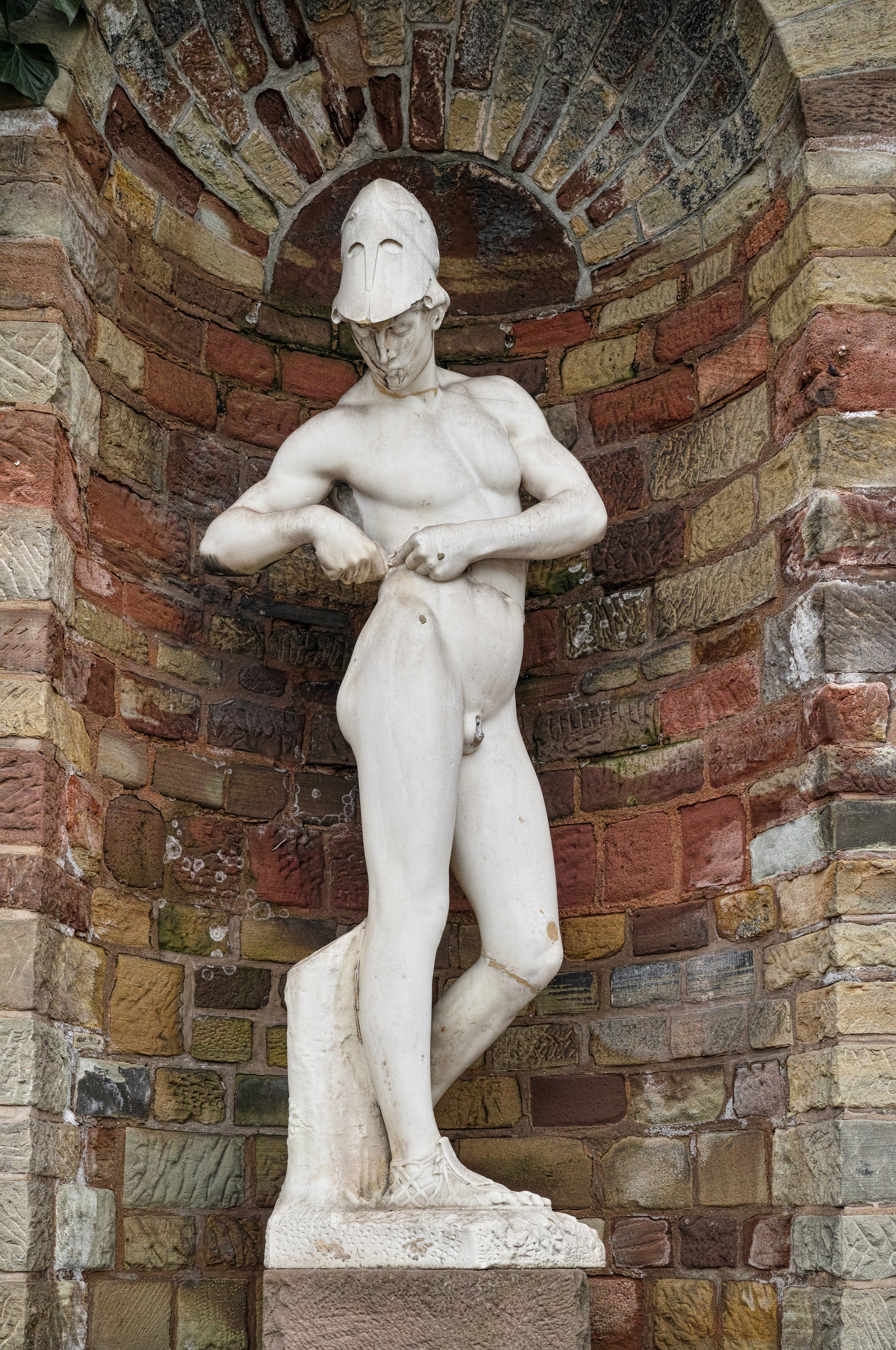 Figur des Telemachos. Ursprünglich als Brunnenfigur vor dem Rathaus Saarbrücken gedacht, steht sie heute in einer Nische an der Trillertreppe in Alt-Saarbrücken.